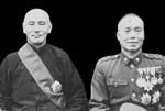 李宗仁及蔣介石 This photo was official photo taken by 國民政府 on 李宗仁及蔣介石 . Photo found in various history books.